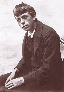 Robert Walser, Ende der 1890er Jahre